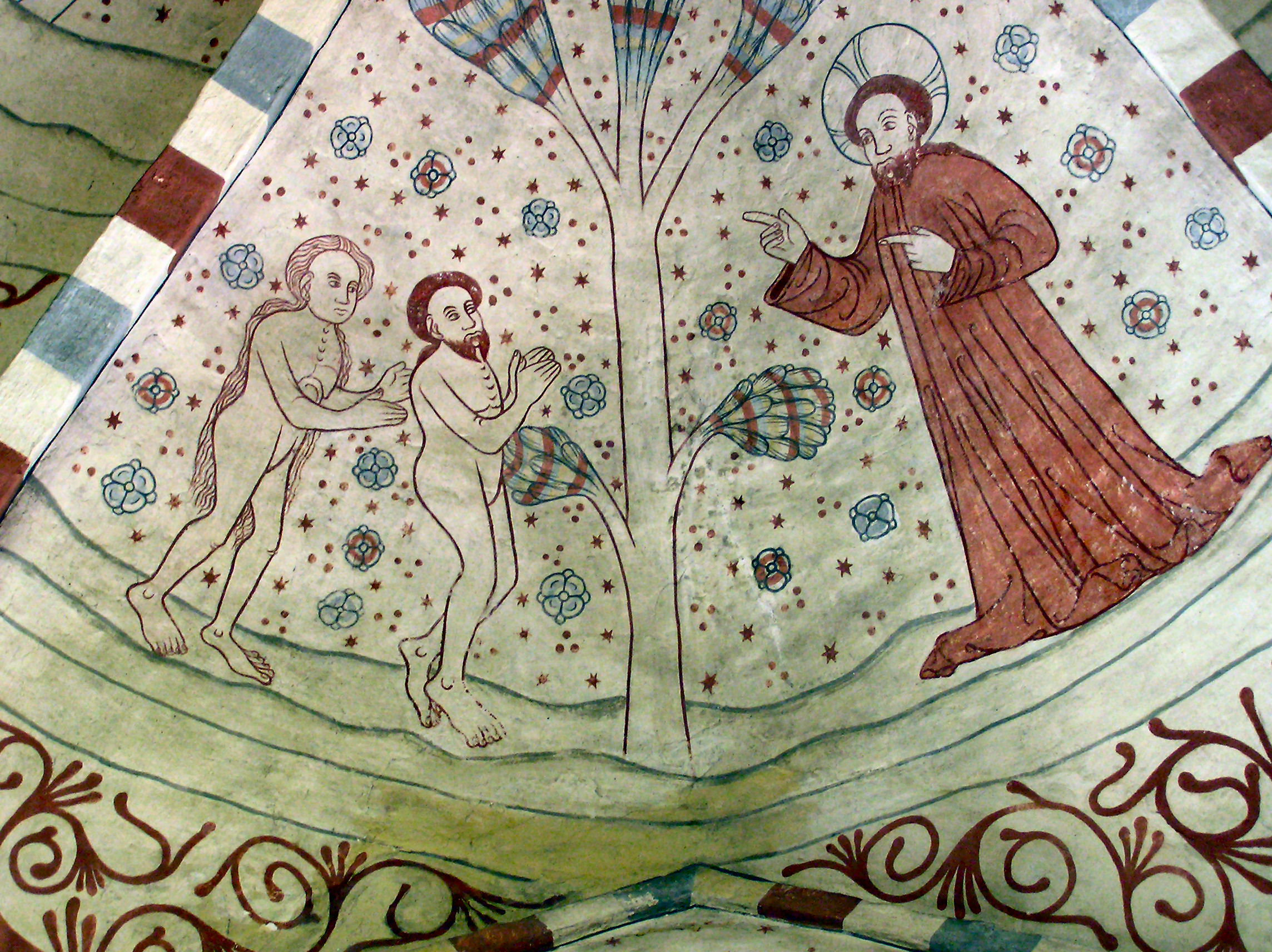 Vittskövle Kirke, Skåne, Kundskabens træ må I ikke spise af (1. Mos. 3,2-3)